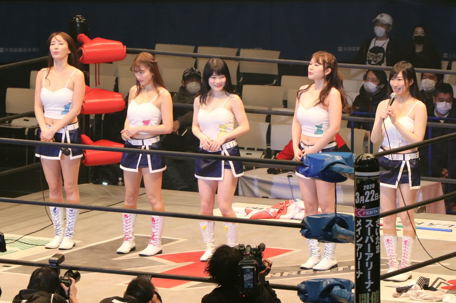 「WRESTLE WARS 2020」3.15東京・大田区総合体育館大会 チアワン This file has been extracted from another file: W-120200315145214 IMG 7093.jpg